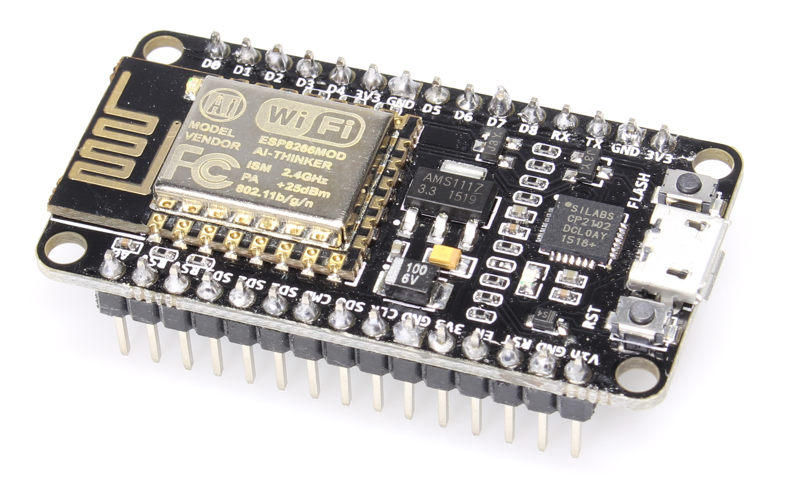 NodeMCU Amica